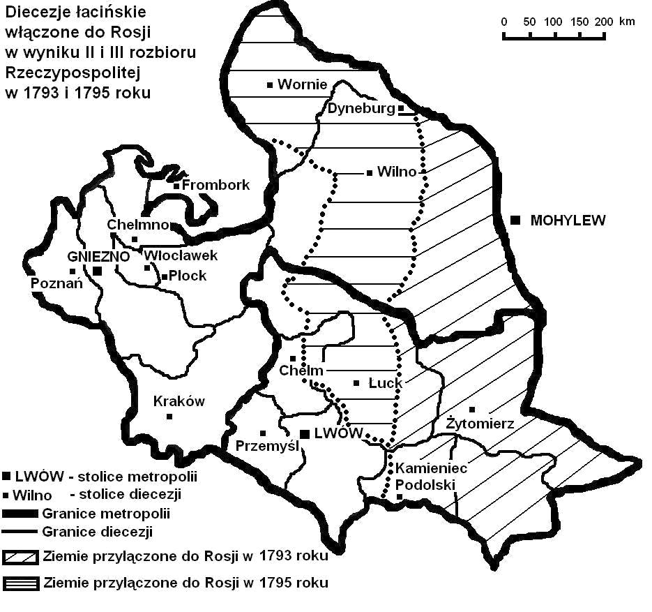 Diecezje łacińskie włączone do Rosji w następstwie II i III rozbioru Rzeczypospolitej w 1793 i 1795 roku